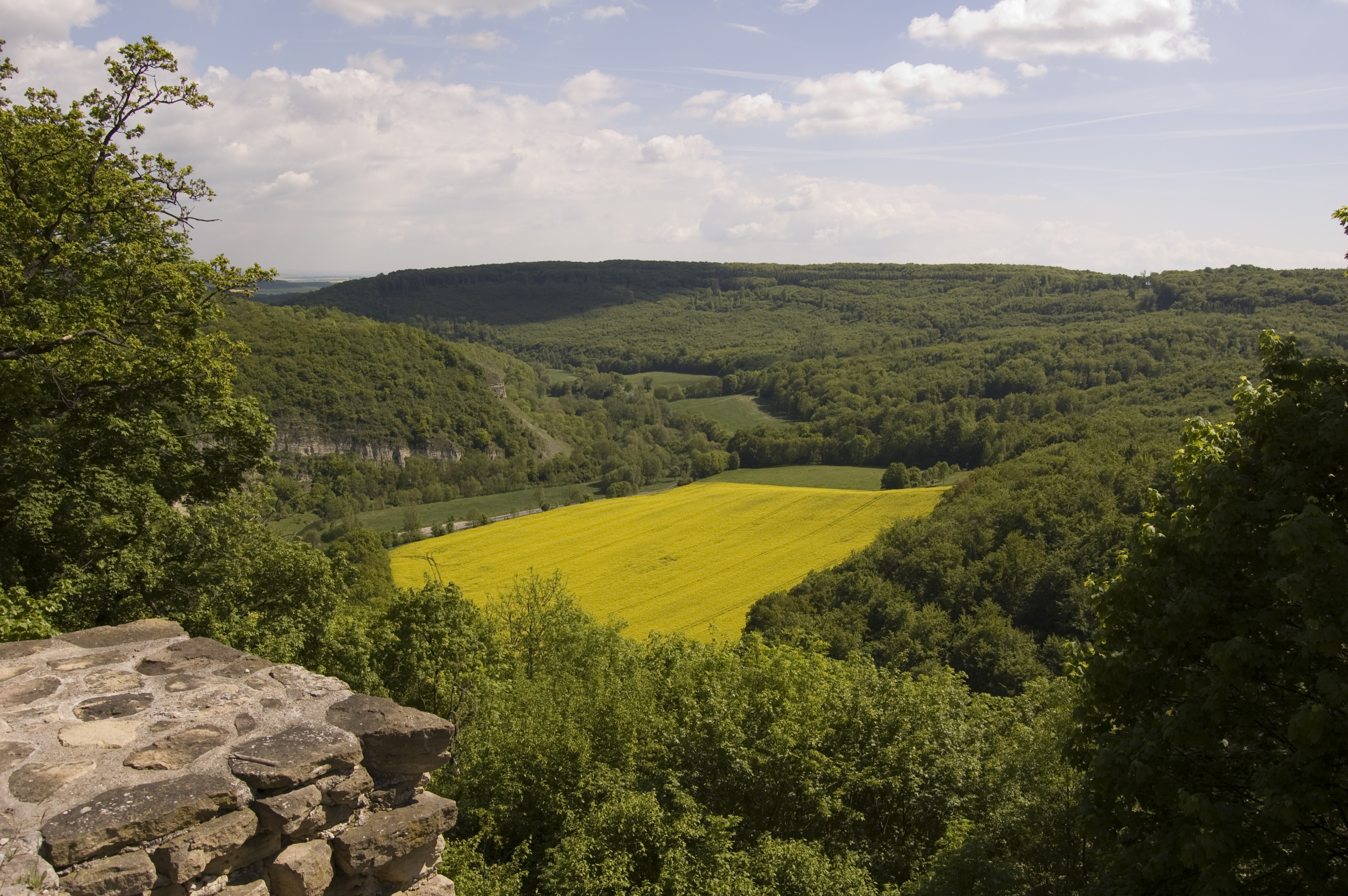 Blick von der Arnsburg bei Seega auf das Wippertal (Richtung Günserode)